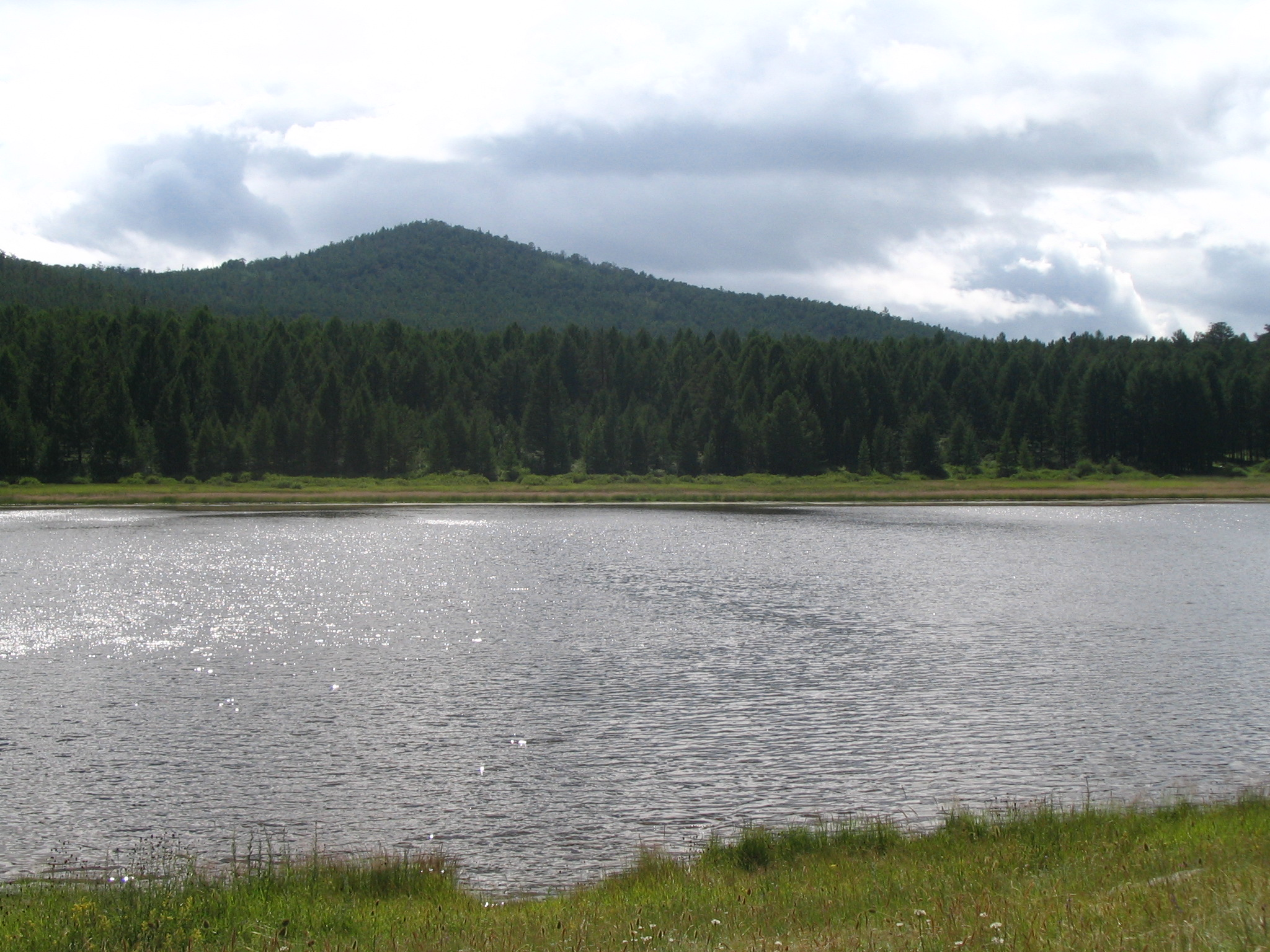 Озеро Шара Нур на острове Ольхон, вид с берега